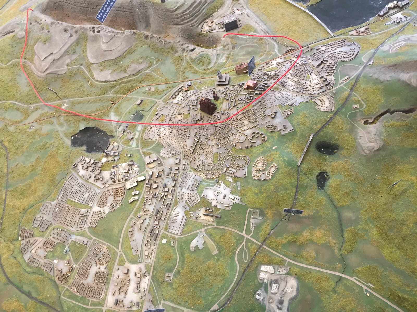 Maqueta de Kiruna i l'àrea d'afectació de les excavacions subterrànies de la mina que obliga a traslladar un 30% de la vila.